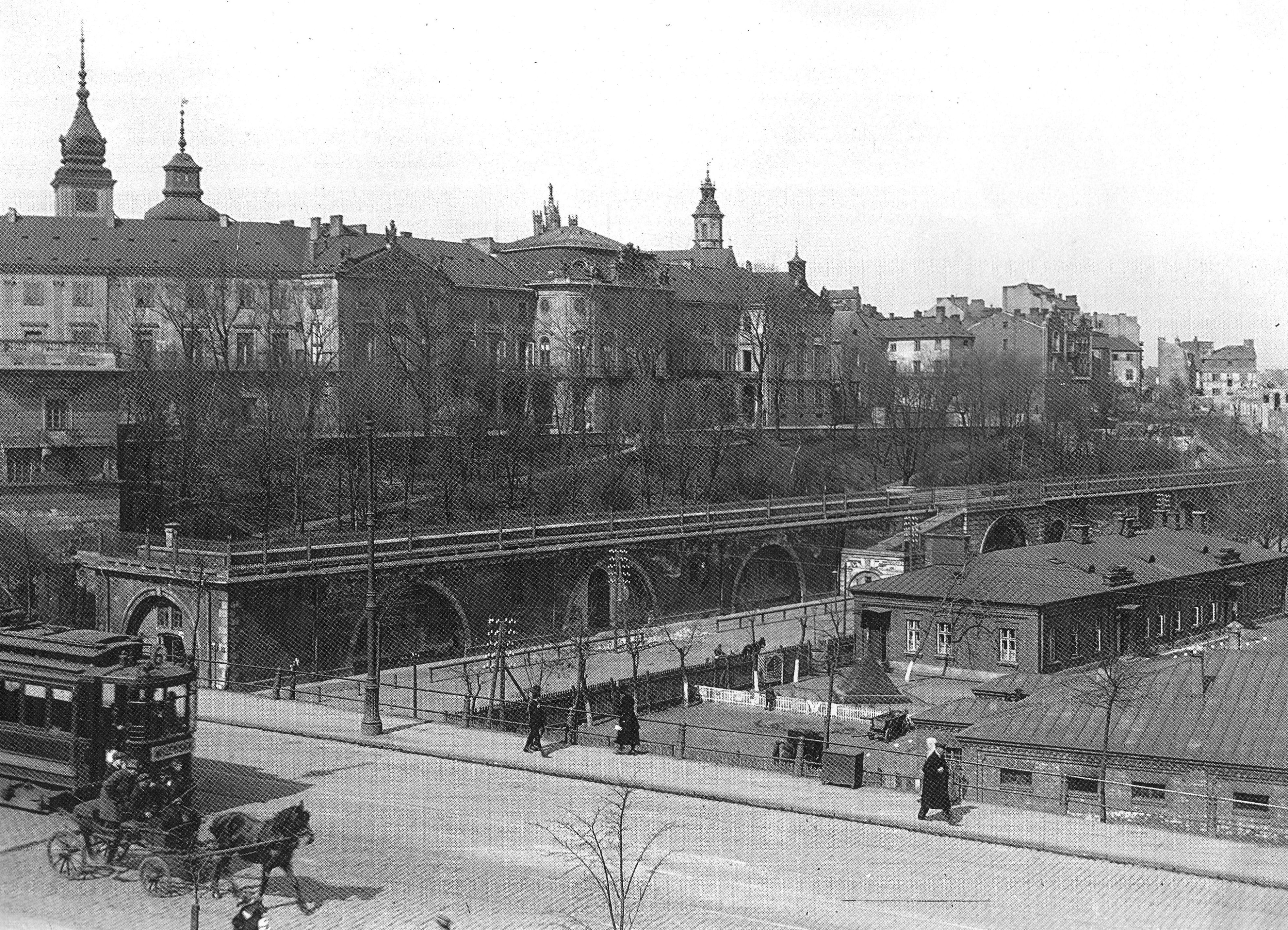 Zamek Królewski od strony Nowego Zjazdu w Warszawie